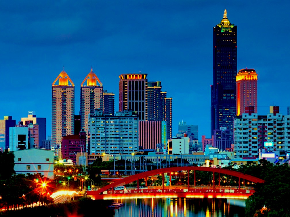 高雄天際線